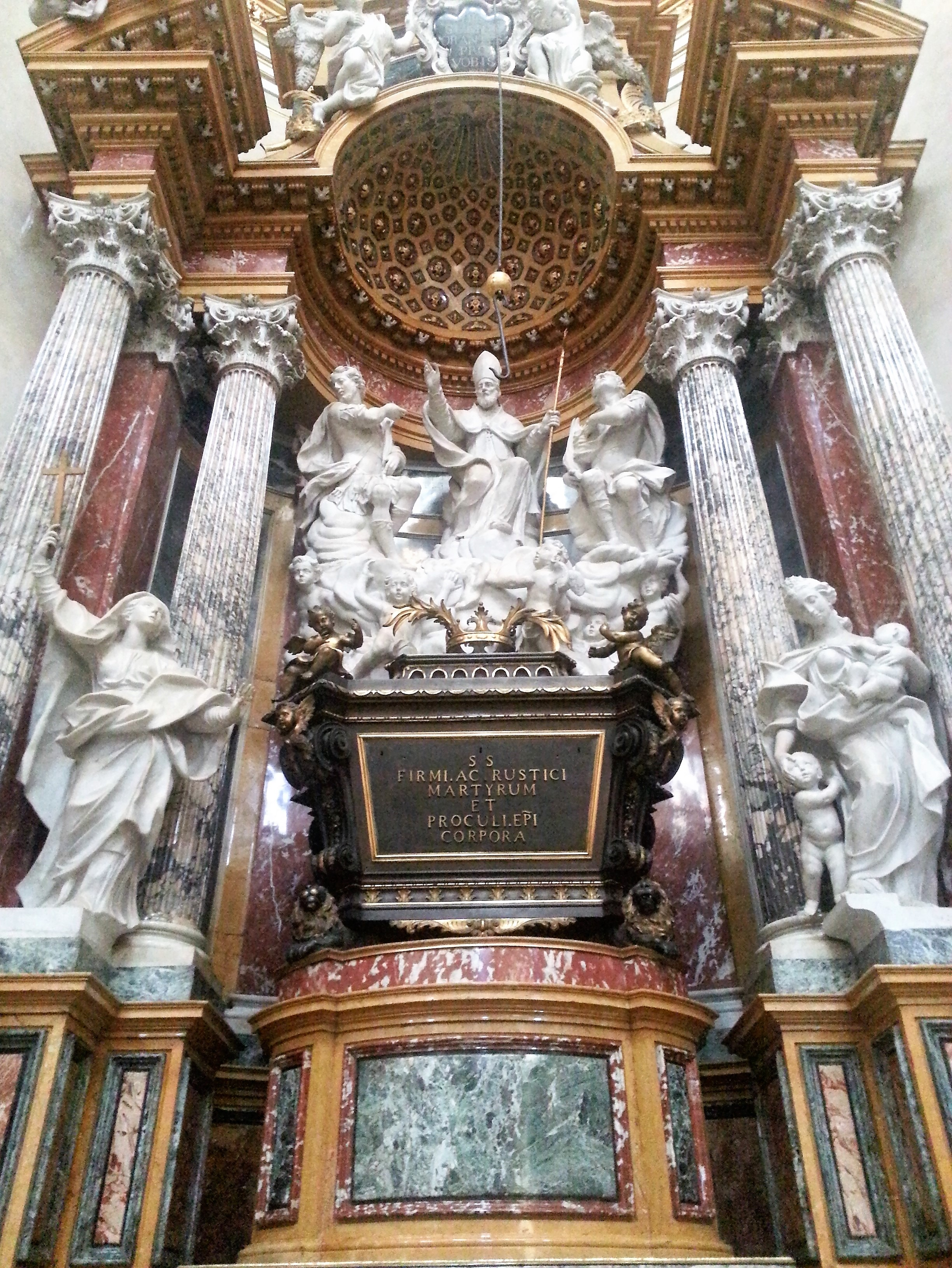 Altare dei santi Fermo, Rustico e Procolo